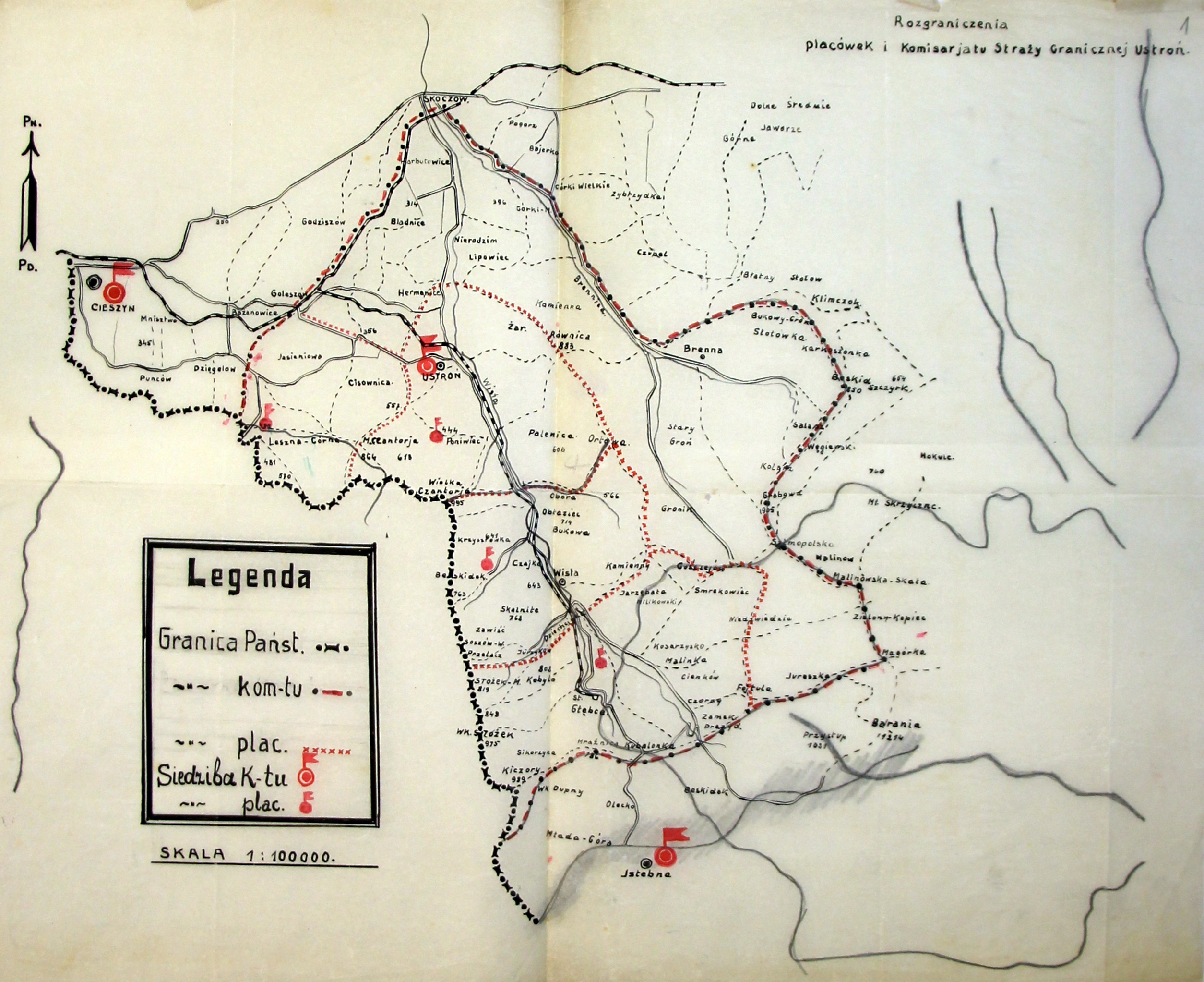 Szkic komisariatu SG Ustroń - lata 30. XX wieku